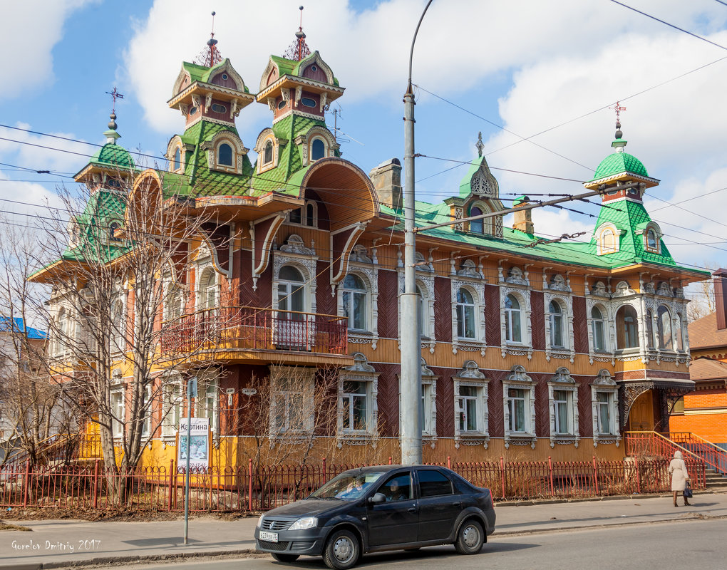 Дом С.Г. Гордеева в Рыбинске, вид с перекрестка ул. Плеханова и ул. Пушкинской